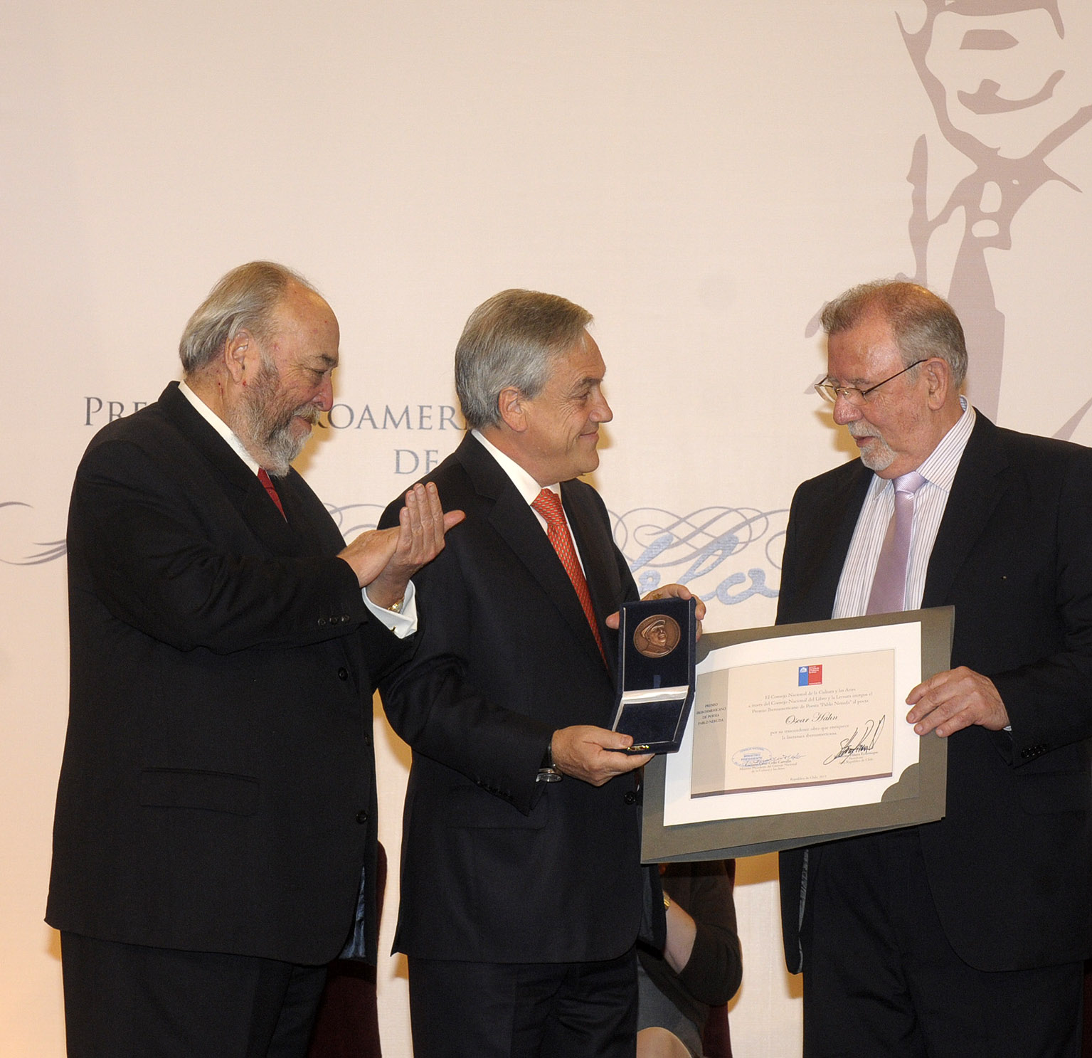 El Presidente de la República entregó esta mañana en el Palacio de La Moneda el Premio Iberoamericano de Poesía Pablo Neruda al poeta chileno Oscar Hahn.